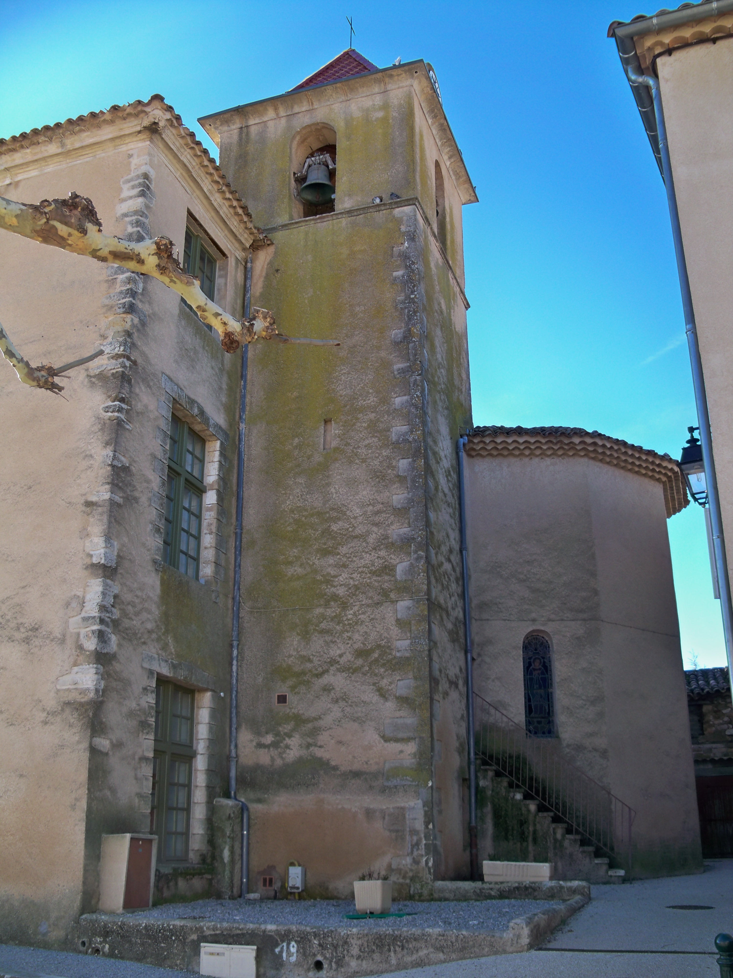 clocher de l'église d'Ongles (04) France